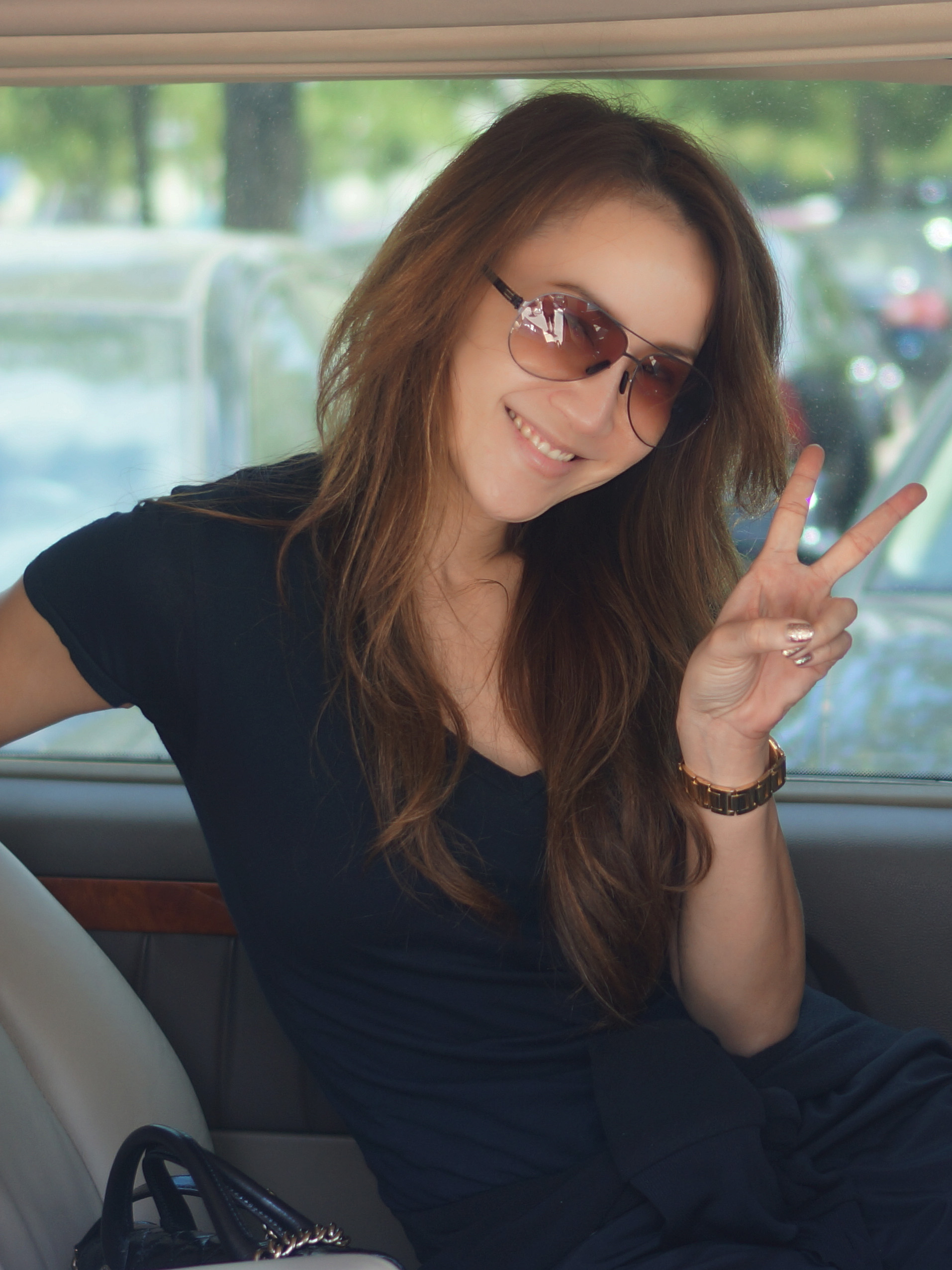 摄于上海虹桥机场